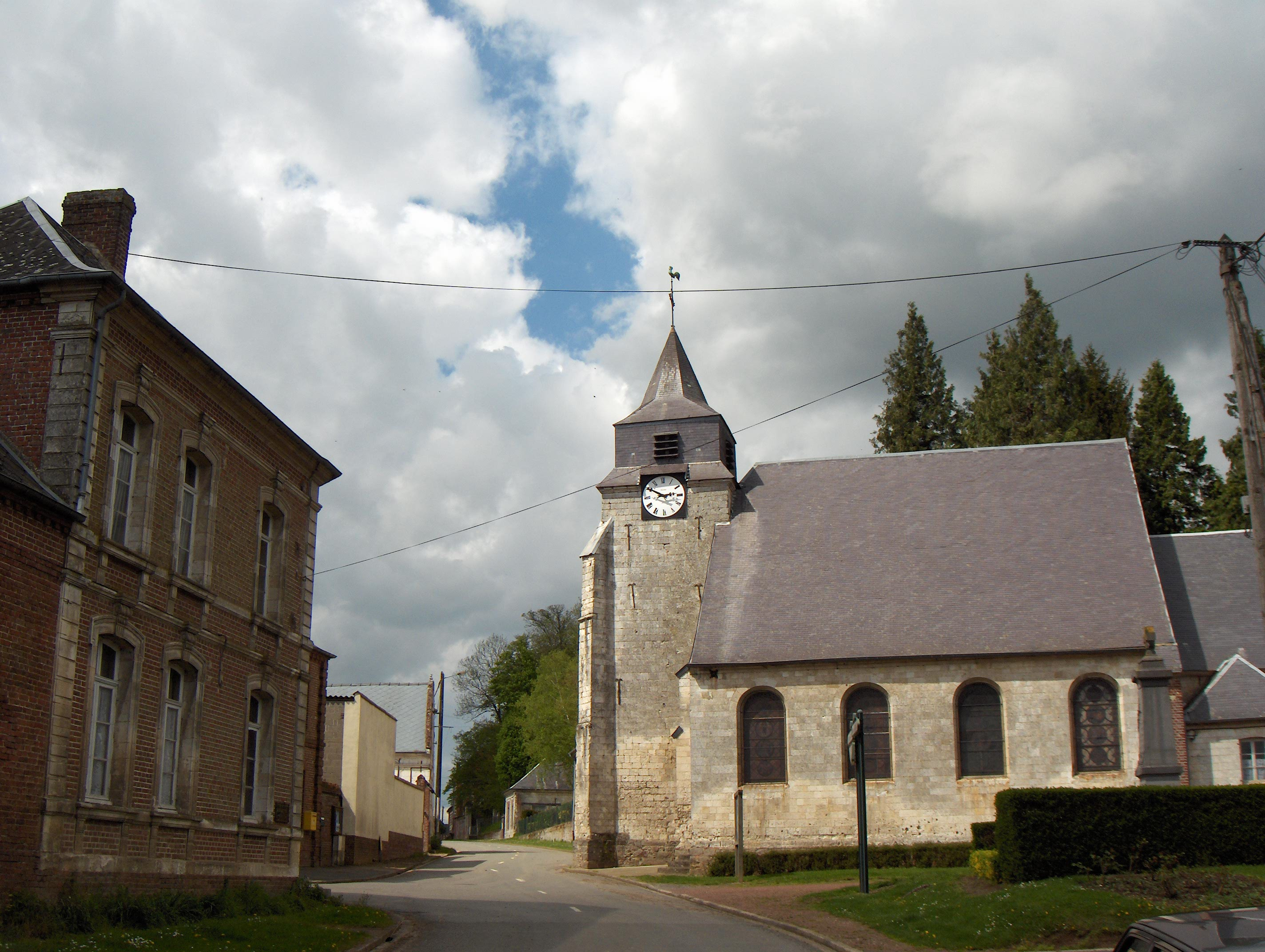 Couin, église Saint-Pierre-aux-Liens (1700) (dépt. Pas-de-Calais, France)